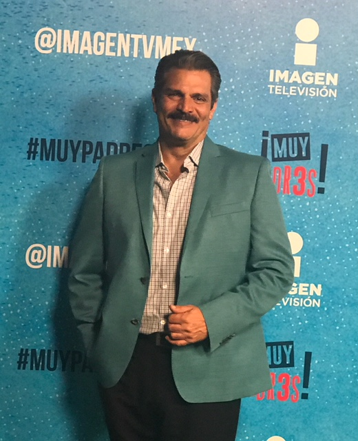 Roberto en la presentación de Muy Padres de Imagen Tv